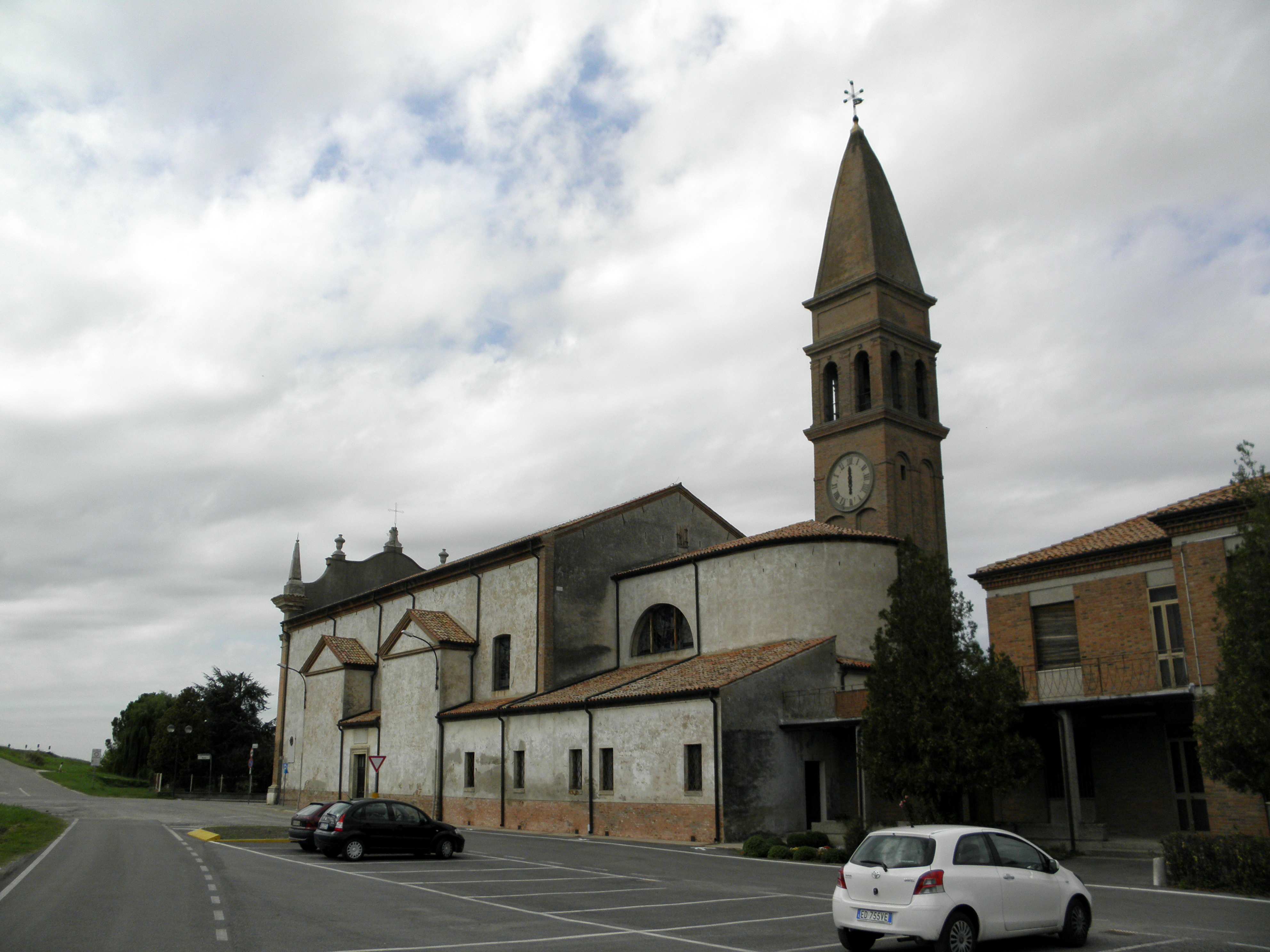 Villanova Marchesana: la chiesa parrocchiale di Santa Maria Assunta, vista absidale.